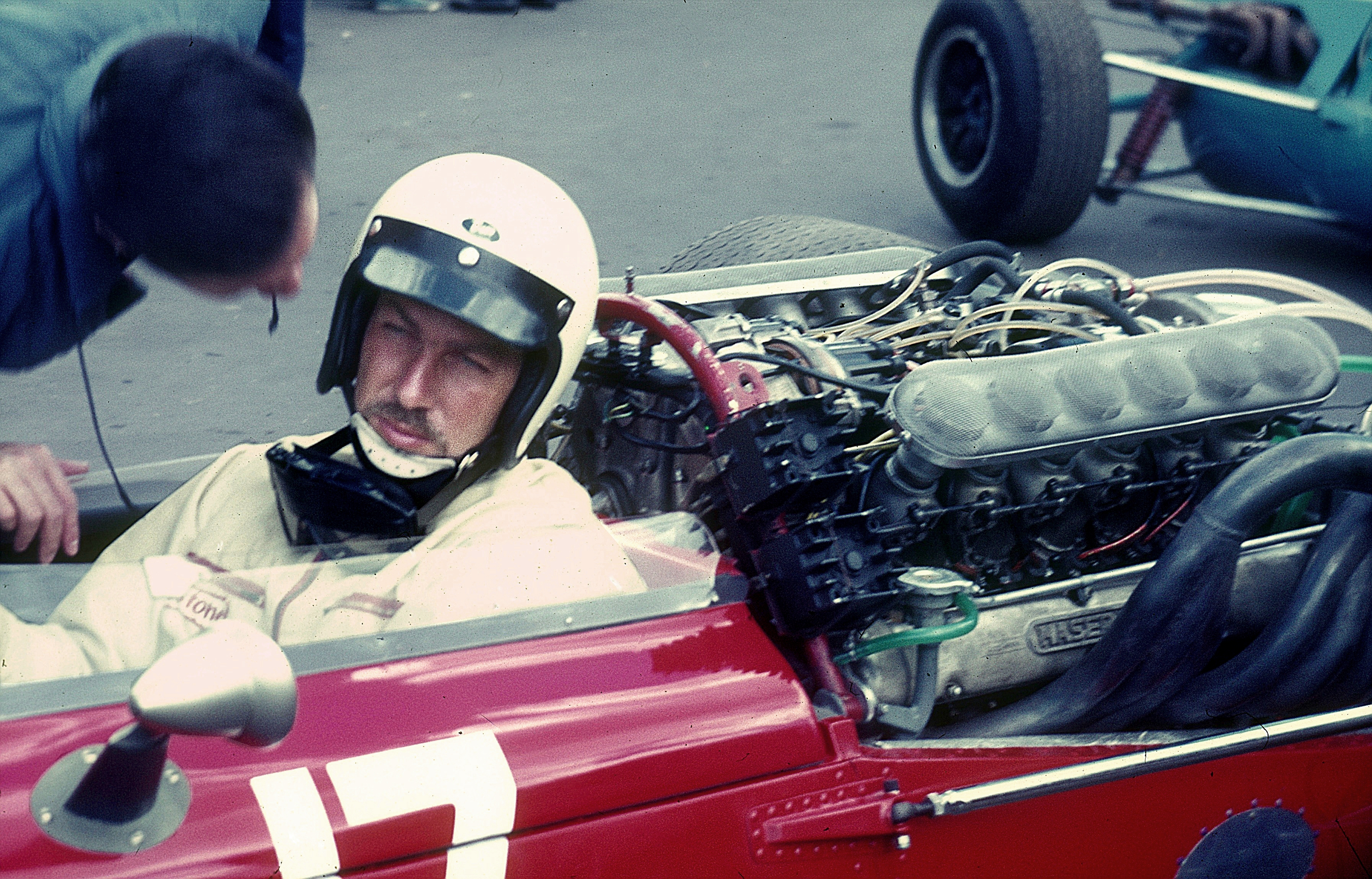 Joakim Bonnier 1966 im Cooper Maserati während des Trainings zum Großen Preis von Deutschland im Fahrerlager des Nürburgrings; links im Bild Pedro Rodriguez